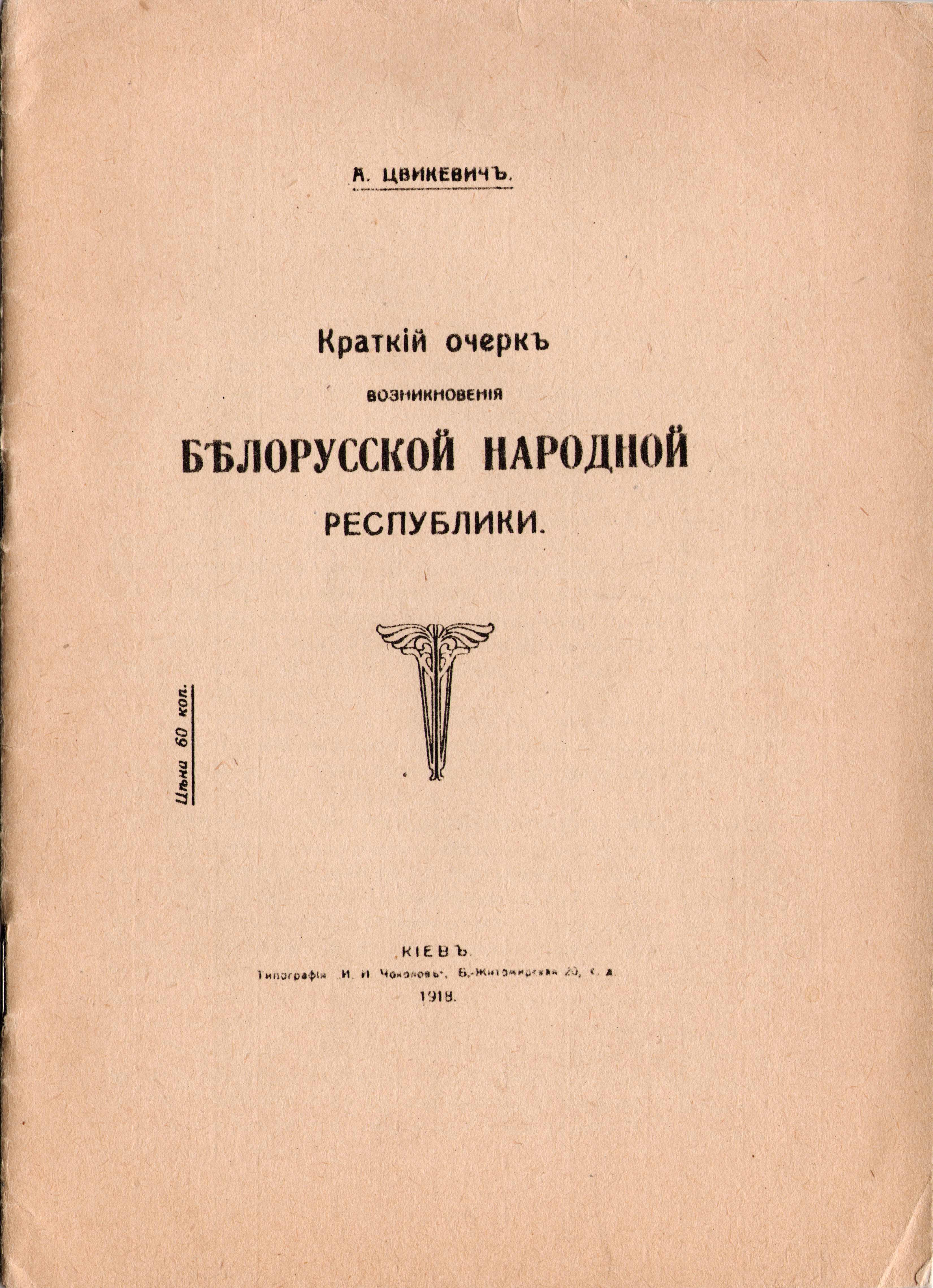 Беларуская (тарашкевіца): Аляксандар Цьвікевіч. Кароткі нарыс зьяўленьня Беларускай Народнай Рэспублікі. 1918, Кіеў